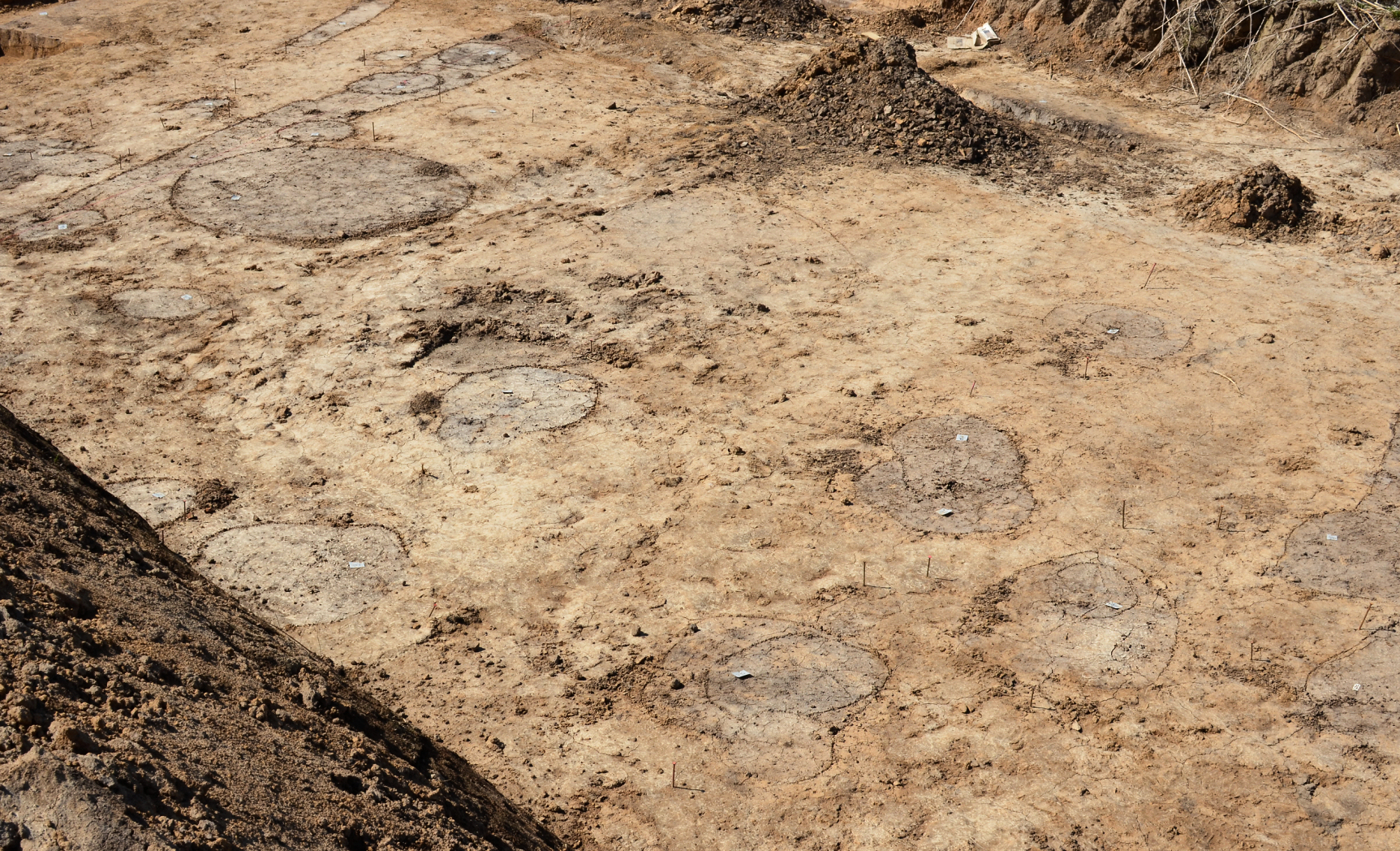 Bandkeramischer Fundplatz von Imbshausen und Eboldshausen, Grabungsstreifen auf der Autobahnostseite, Pfostengruben oder Abfallgruben